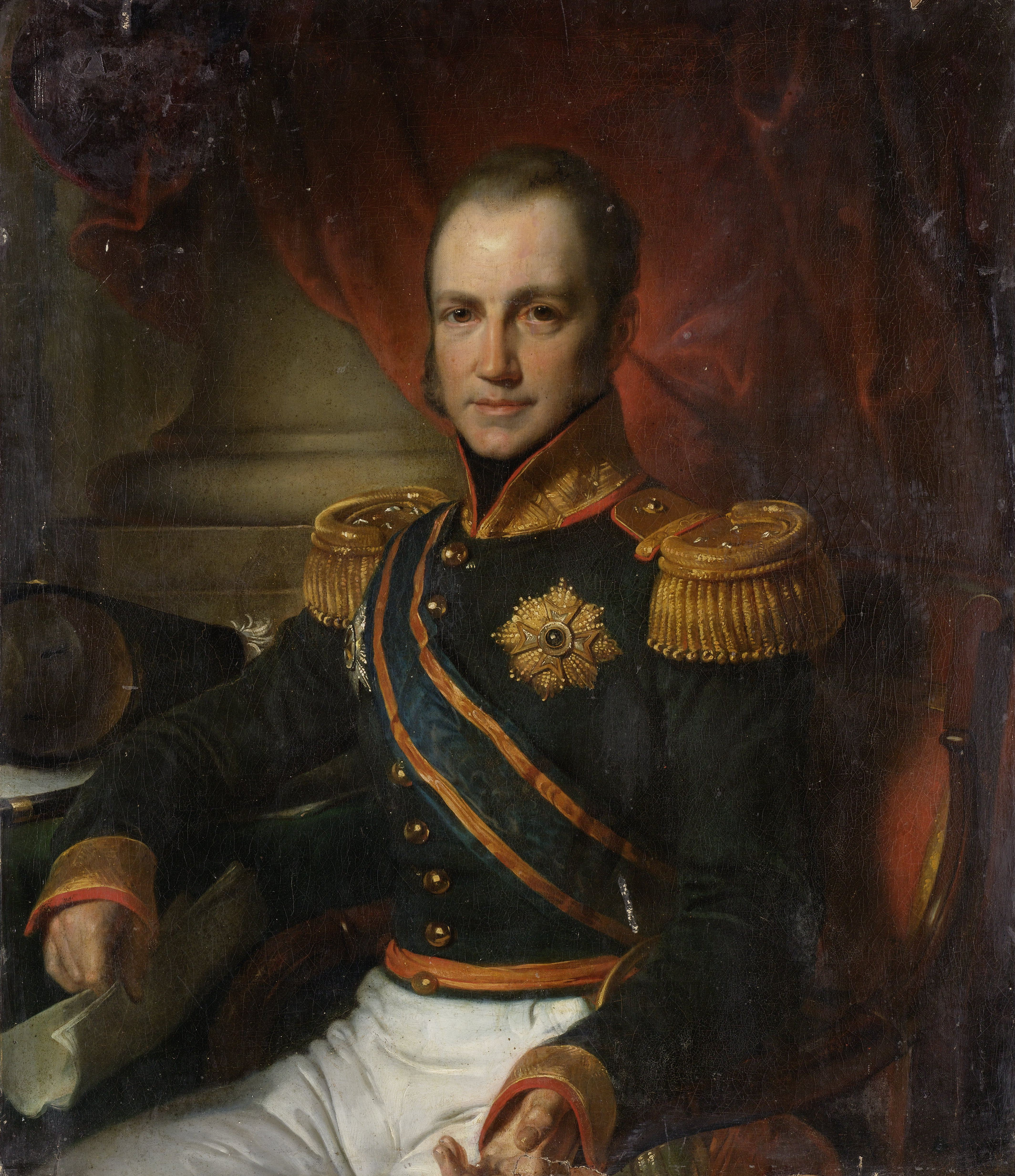 "Godart Alexander Gerard Philip Baron van der Capellen (1778-1848). Governor-General (1816-26)"